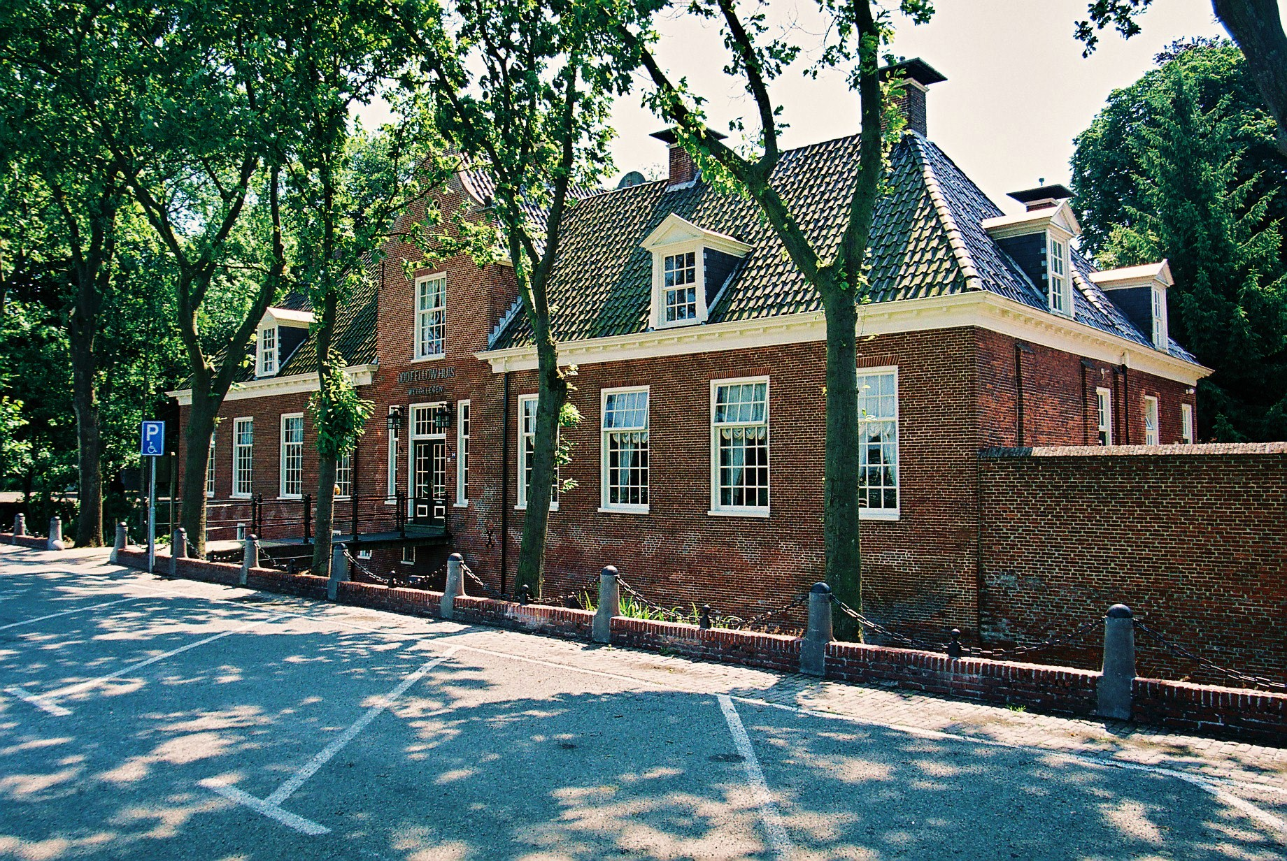 Borg Welgelegen te Sappemeer